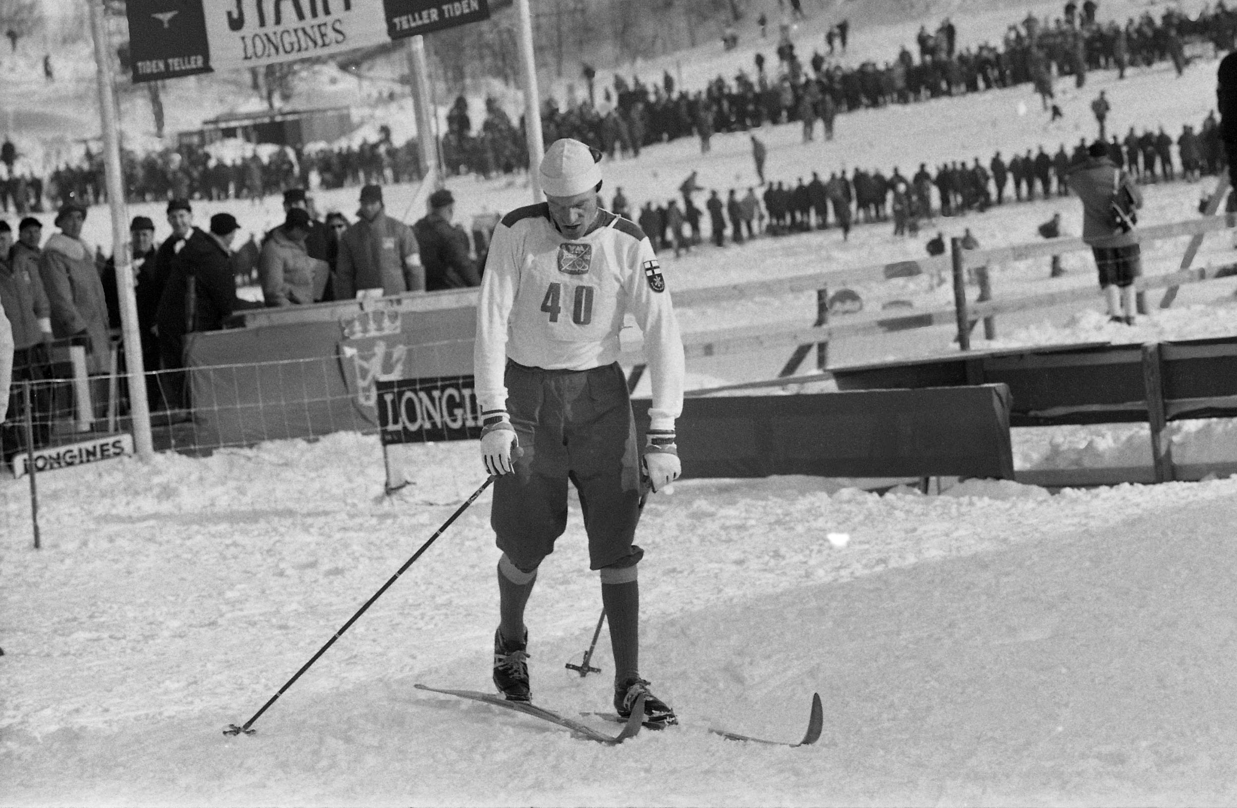 Beskrivelse: Kalevi Laurila etter passering av målstreken. Laurila ble nr. 2 Sted: Oslo År: 1966 Fotograf: Billedbladet NÅ/ Klæboe Arkivref.: RIKSARKIVET- RA/PA/0797/U/Ua/3903_5B_25A